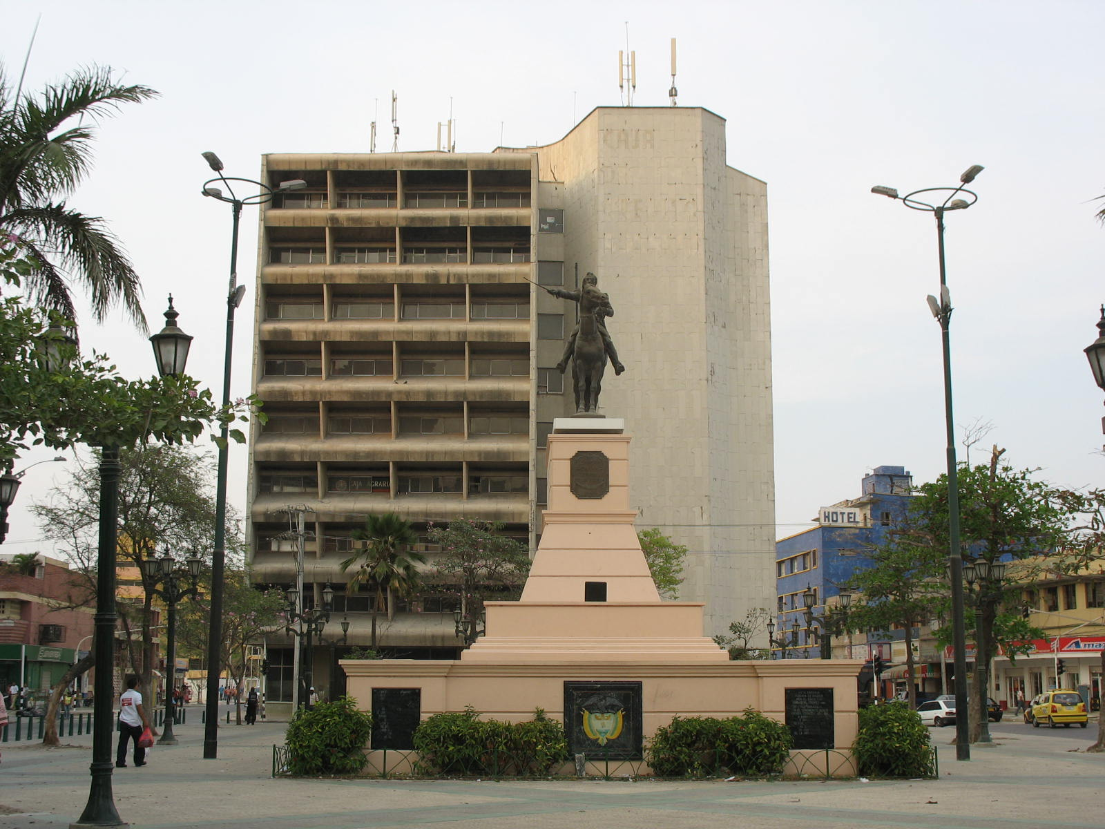 Plaza de Bolívar,Barranquilla